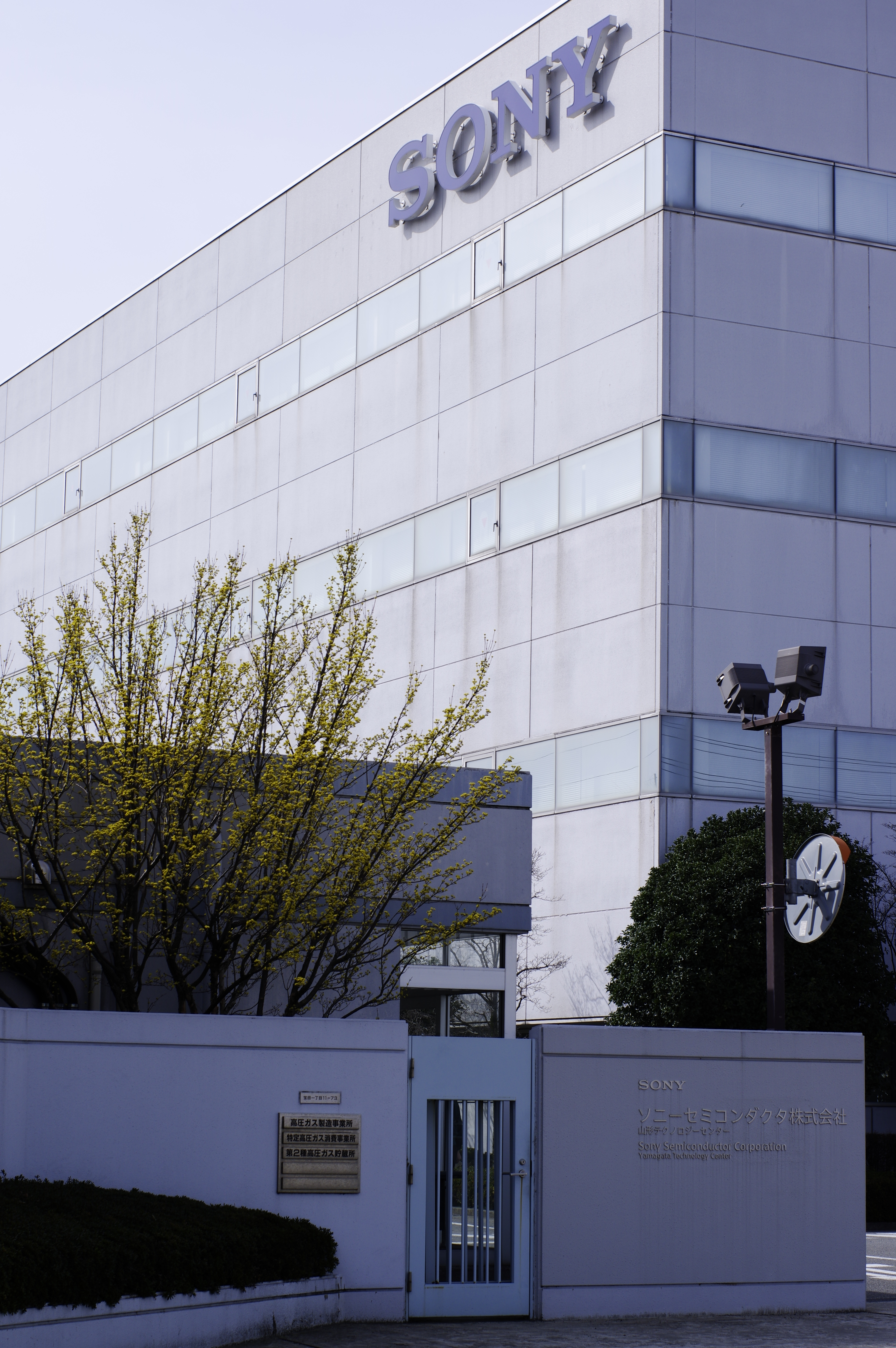 ソニーセミコンダクタ山形テクノロジーセンター。